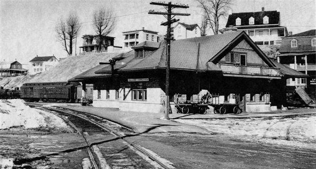 Gare du Québec Central à Vallée-Jonction